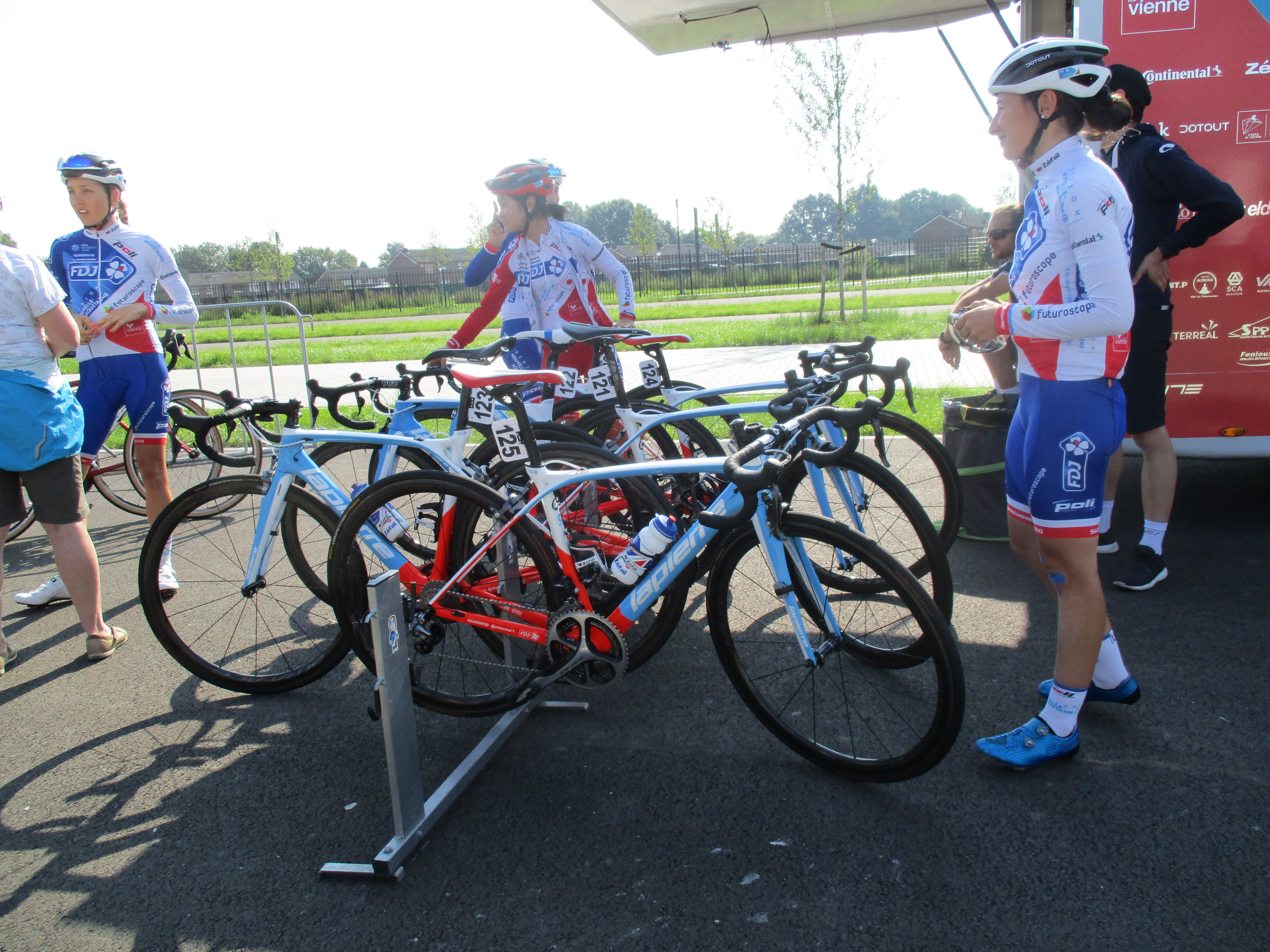 Start van de 6e etappe van de Boels Ladies Tour 2017 op het Tom Dumoulin Bike Park in Sittard-Geleen.